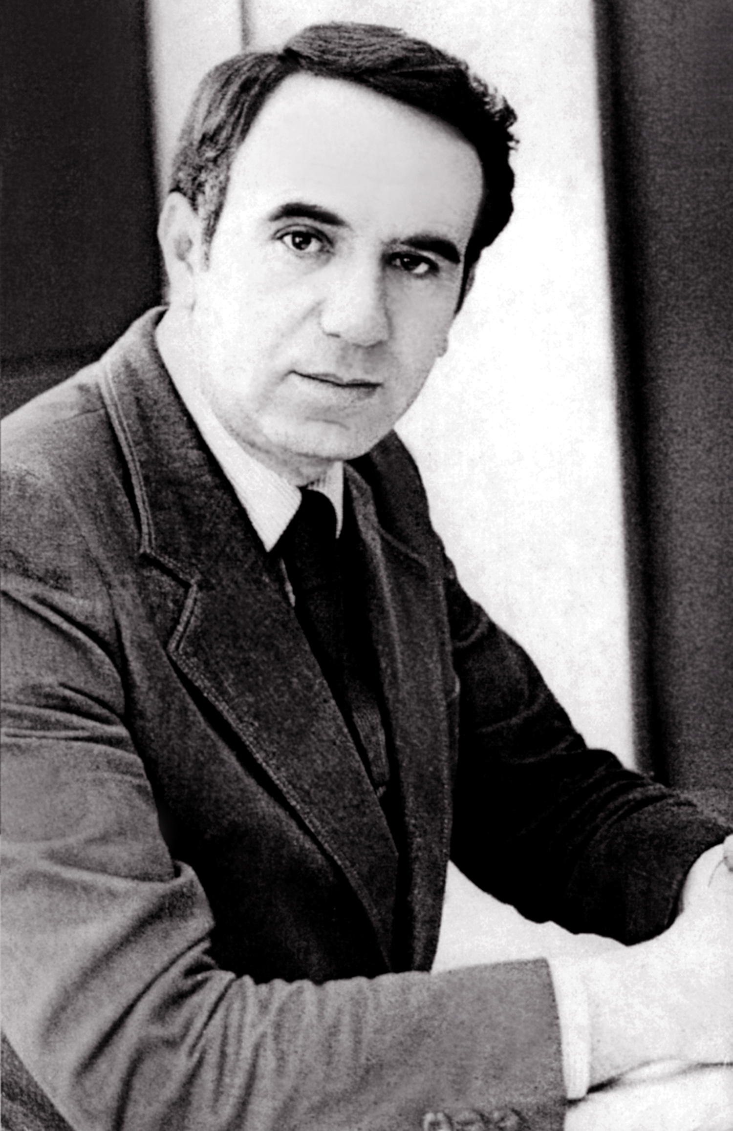 Shyqri Kushevica bëri emër jo vetëm si sportist...